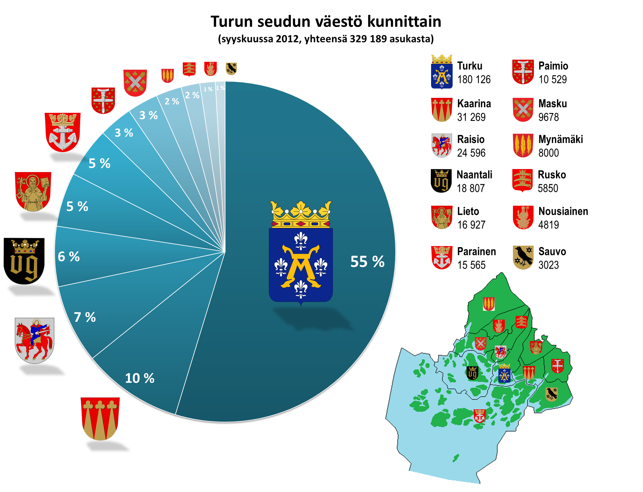 Turun seudun väestö kunnittain syyskuussa 2012